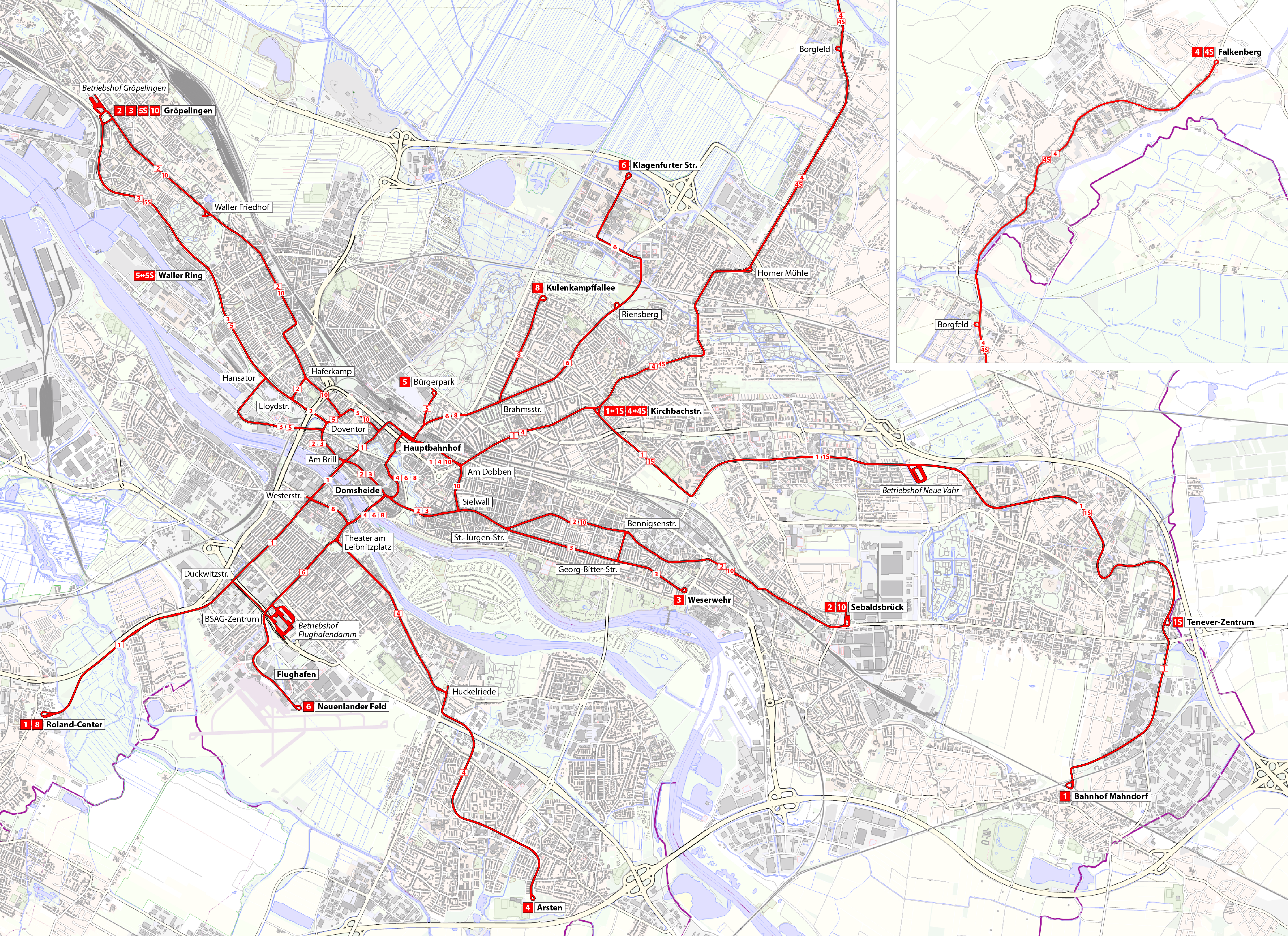 Karte der Straßenbahn Bremen: Streckennetz auf topographischer Karte (die Schnellbahnlinien sind teilweise fehlerhaft eingetragen, außerdem wurde die Linie 3S inzwischen eingestellt)